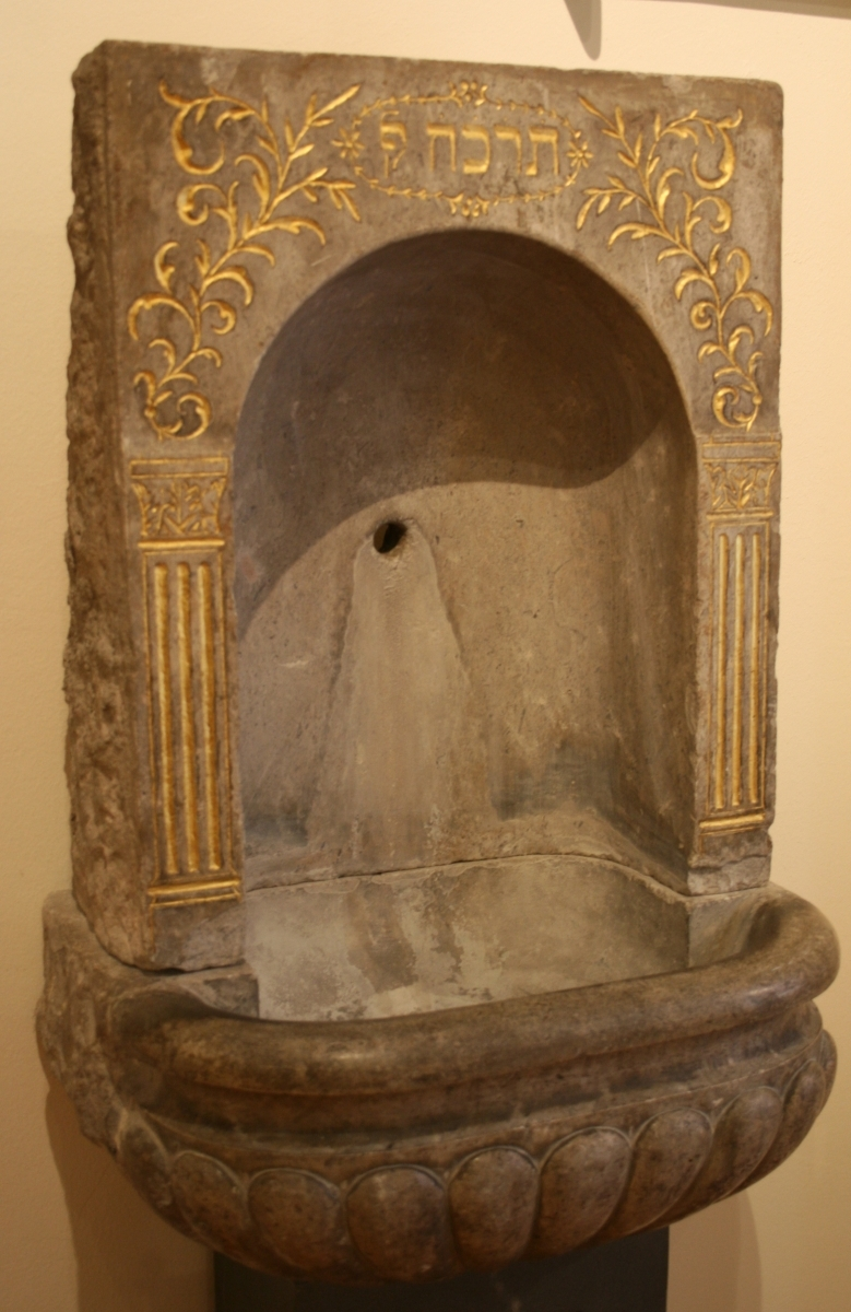 Zidni umivaonik iz sinagoge, Zagreb, 1865./66. u Muzeju grada Zagreba.